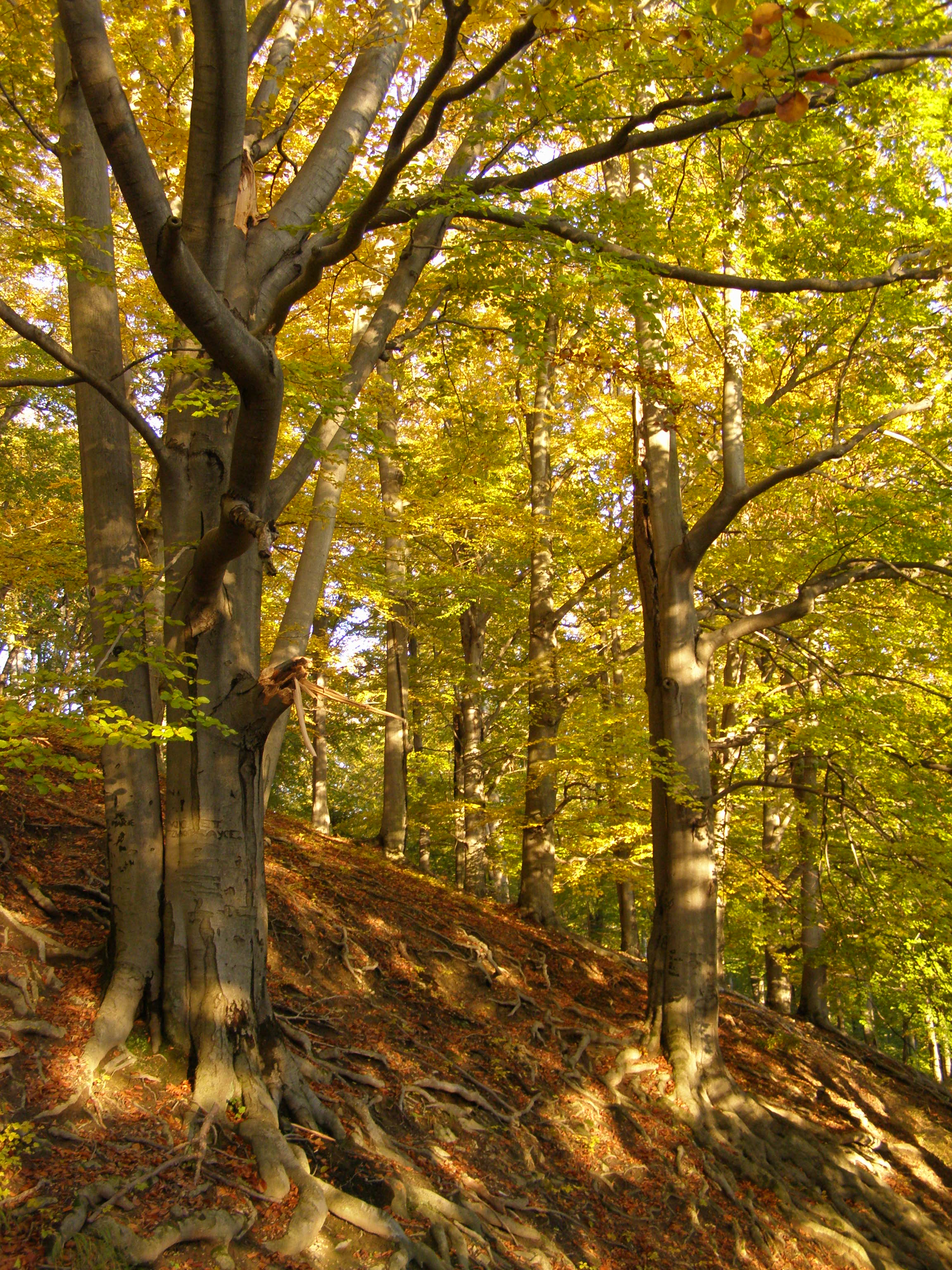 Česky: Hukvaldy, Hradní vrch, bučina